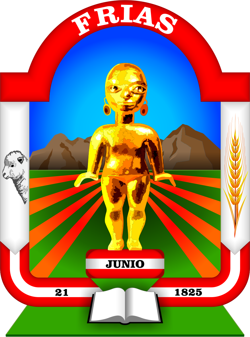 Distrito de Frías - Provincia de Ayabaca - Región Piura